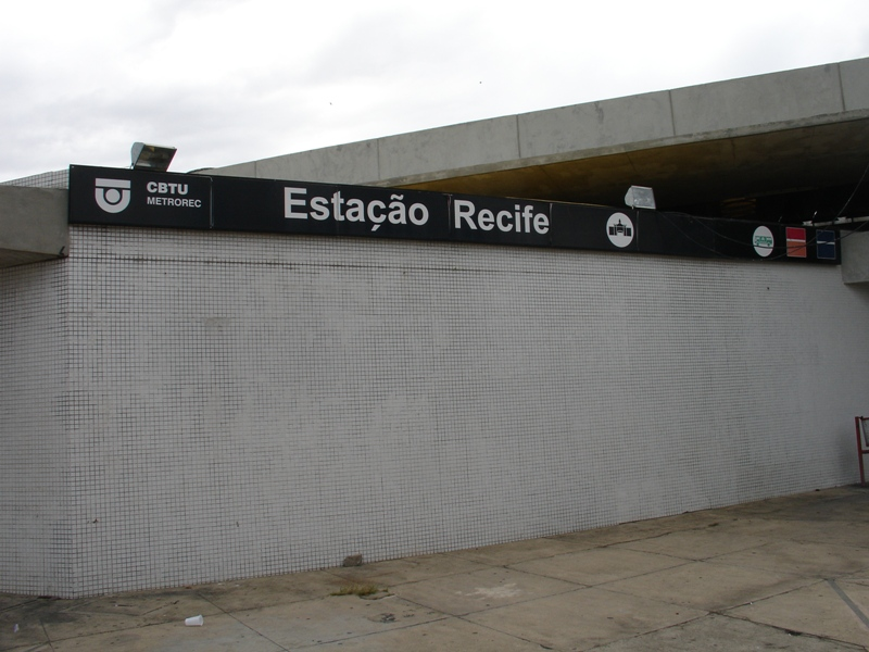 Estação Central - Recife, Brasil.